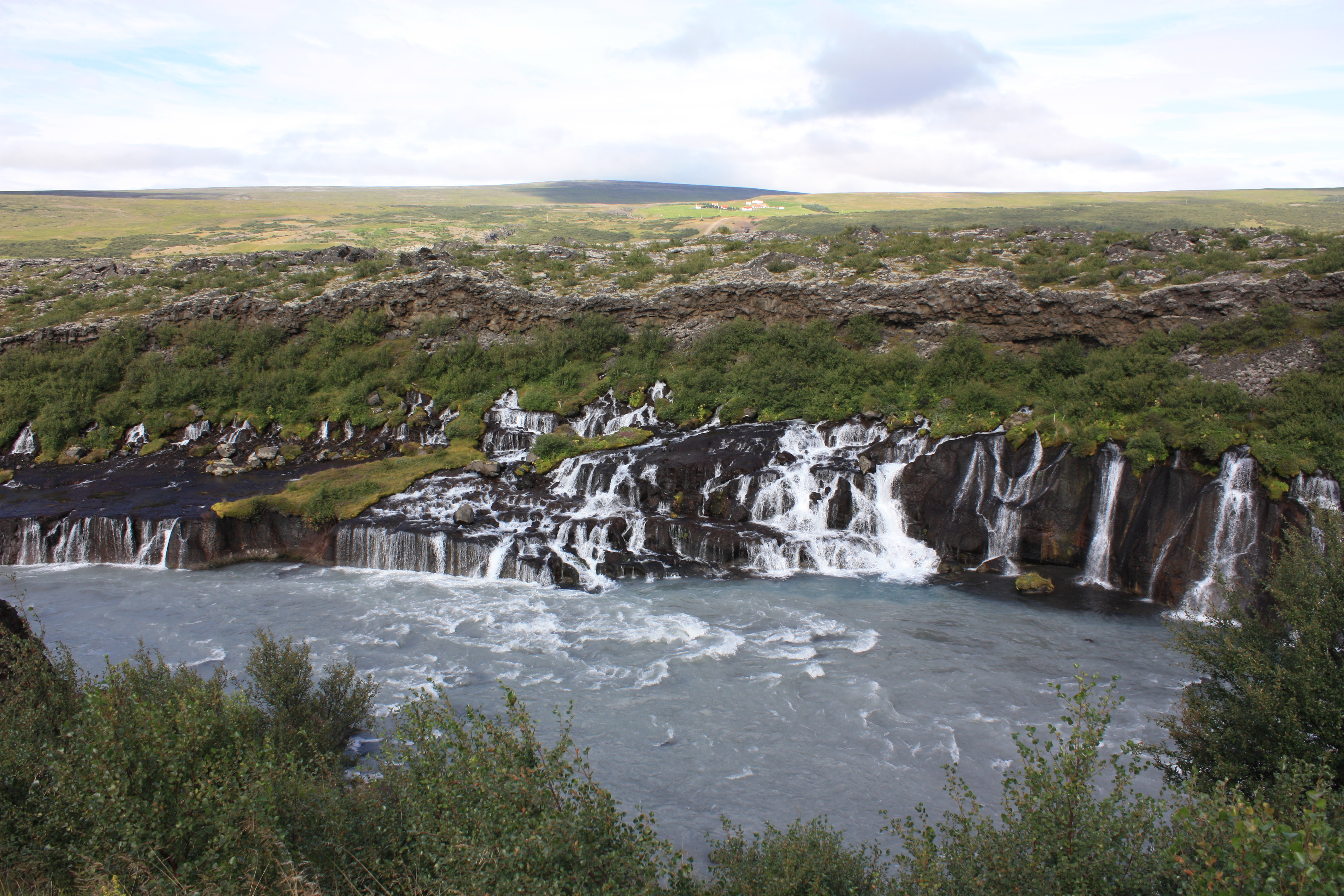 Hraunfossar